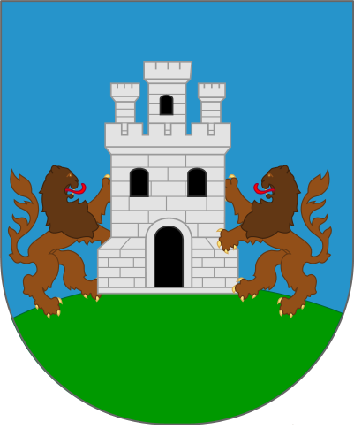 Debako armarria